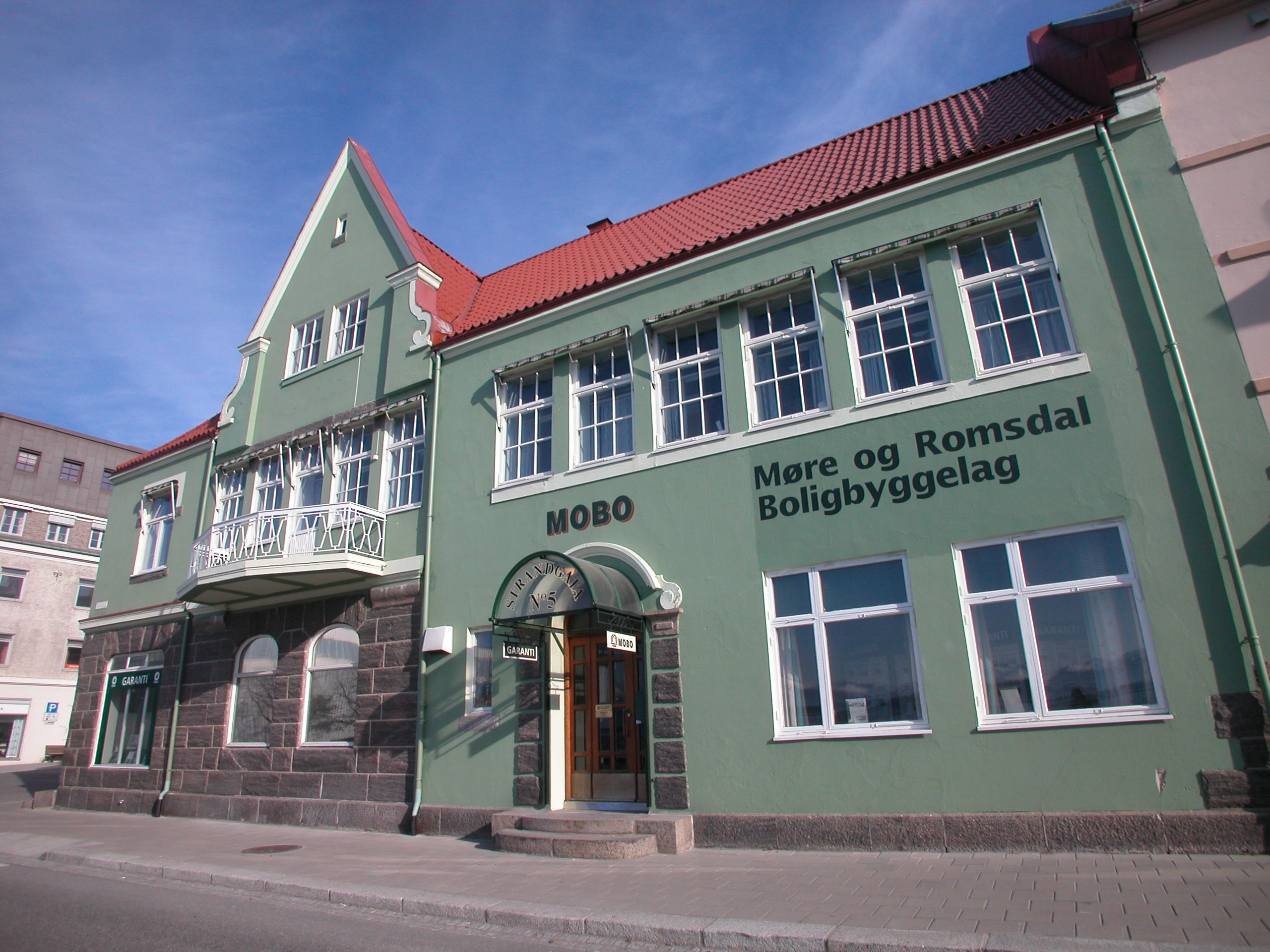 MOBOs lokaler i Molde.